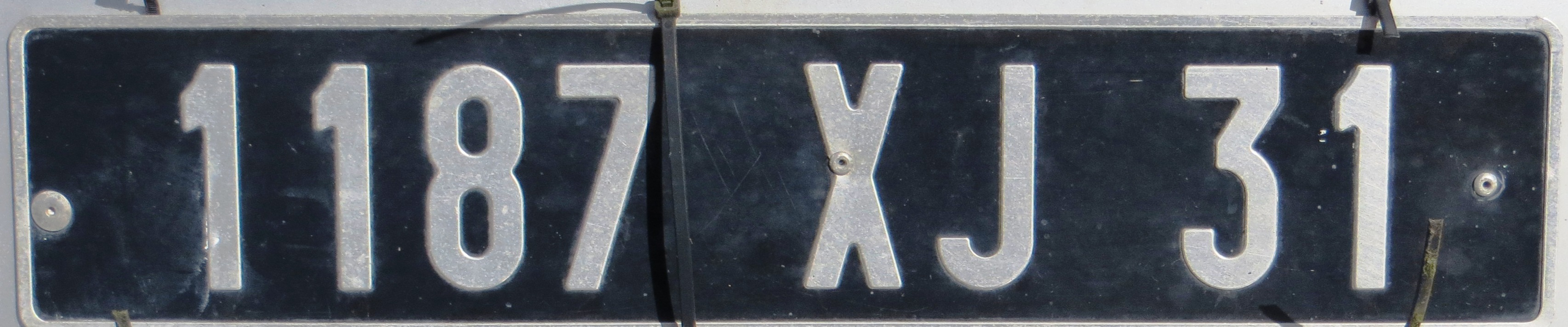 Oud Franse kenteken (Haute-Garonne)